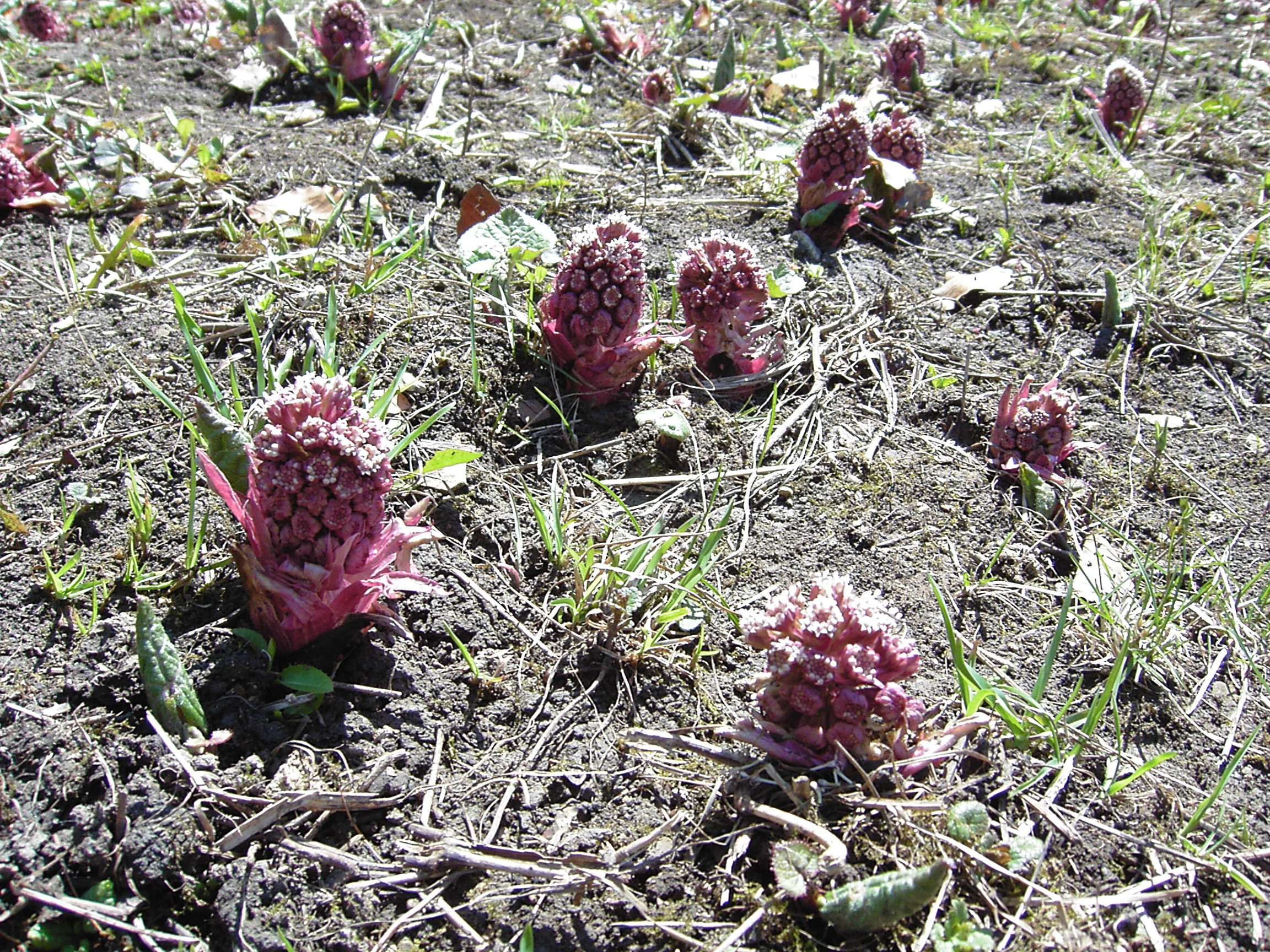 PR Bílé potoky. Jarní květena.